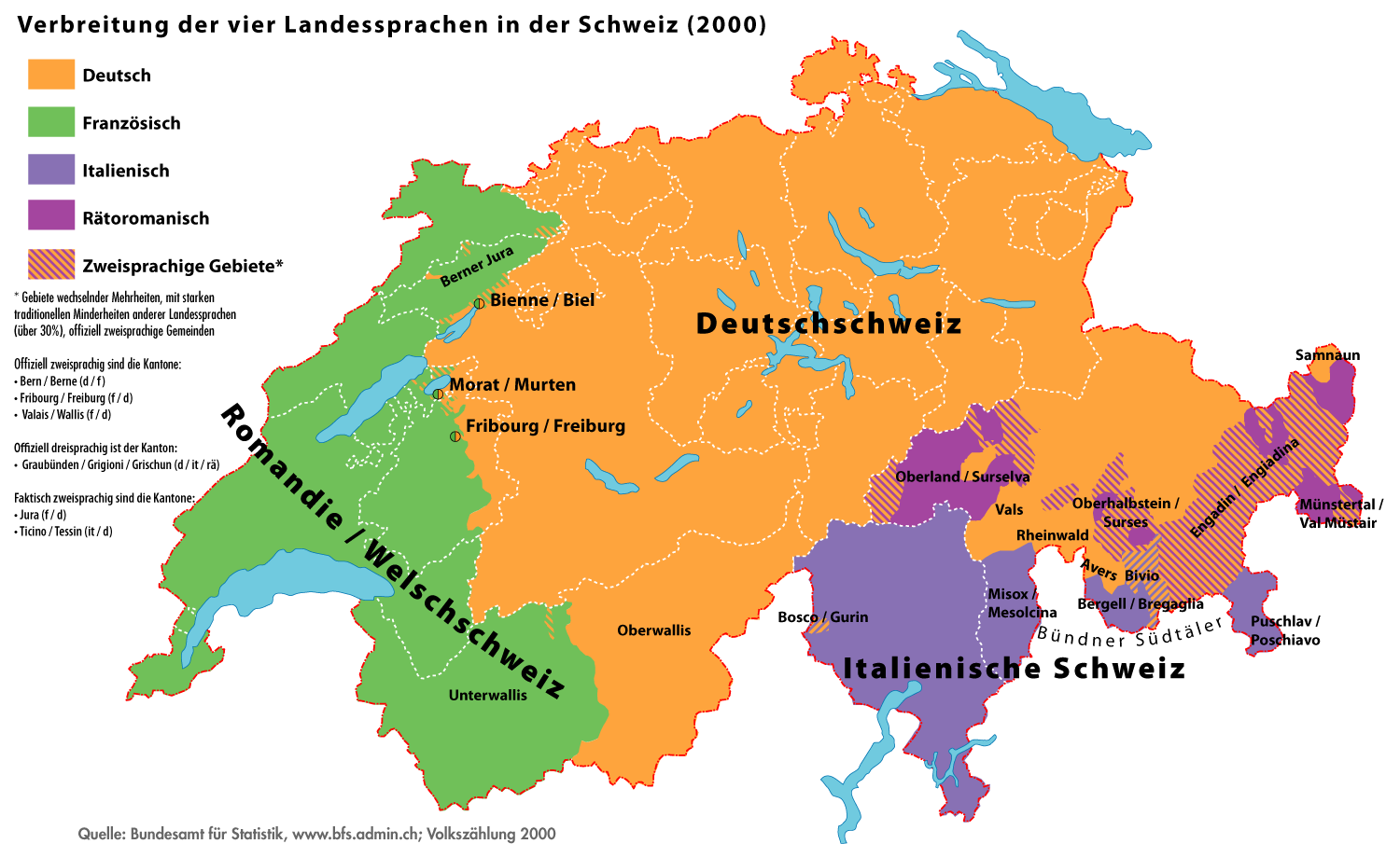 Geographische Verbreitung der vier Landessprachen in der Schweiz im Jahr 2000